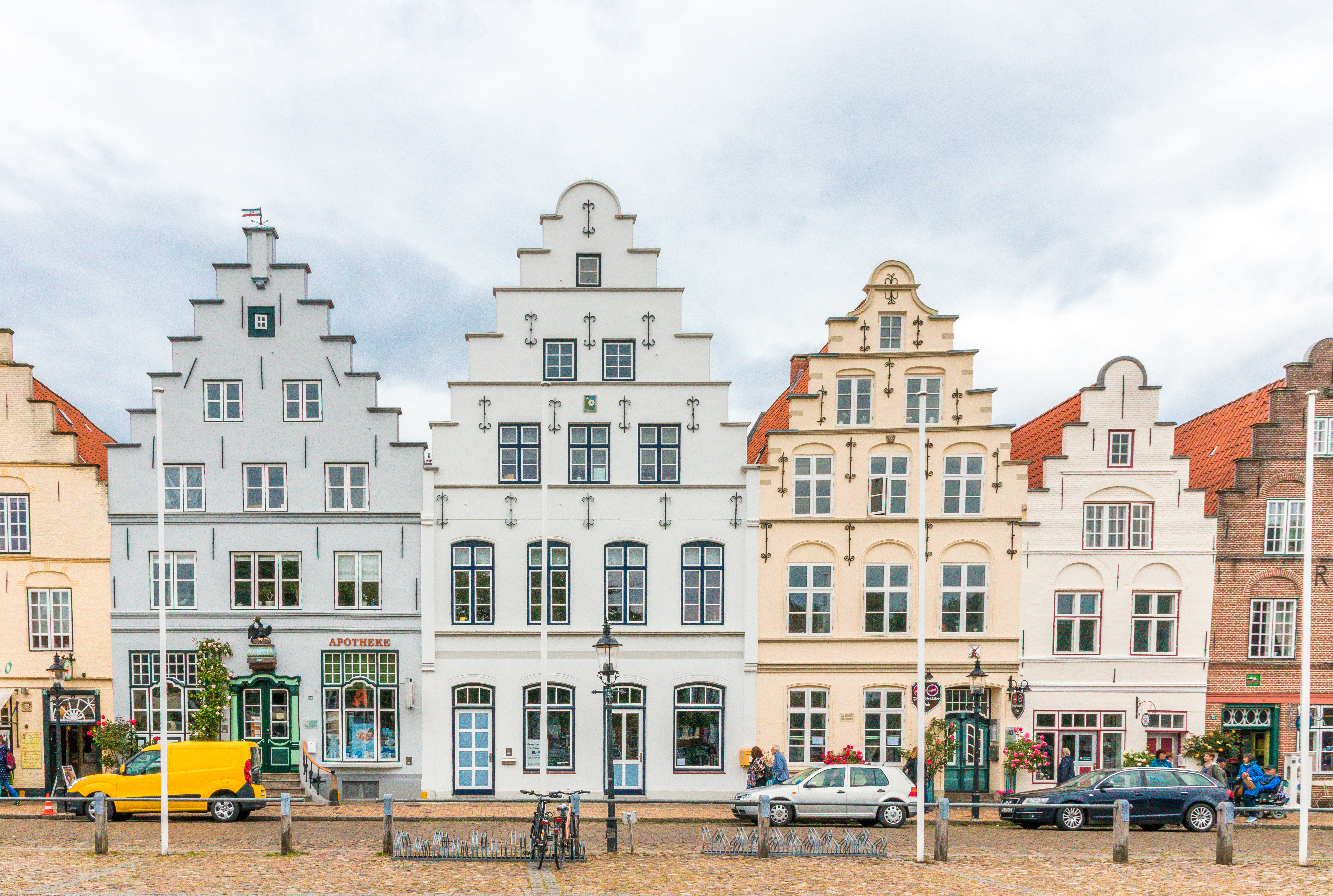 Friedrichstadt - Gebäudeensemble am Markt